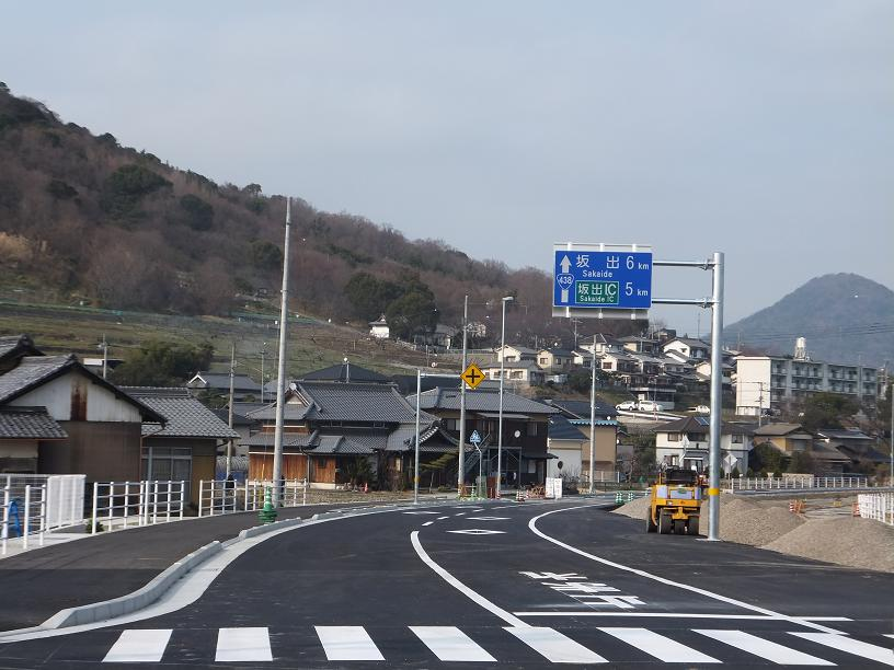 国道438号飯山バイパス。飯野山の東、丸亀市飯山町東坂元で工事中